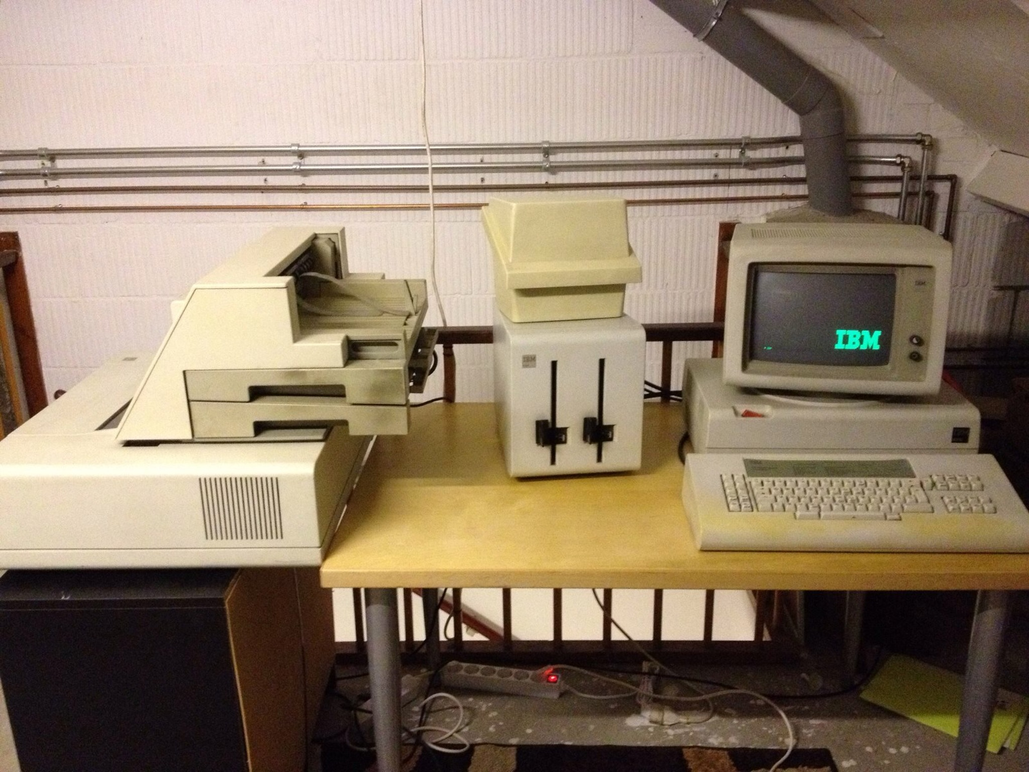 IBM Display Writer System uit 1980